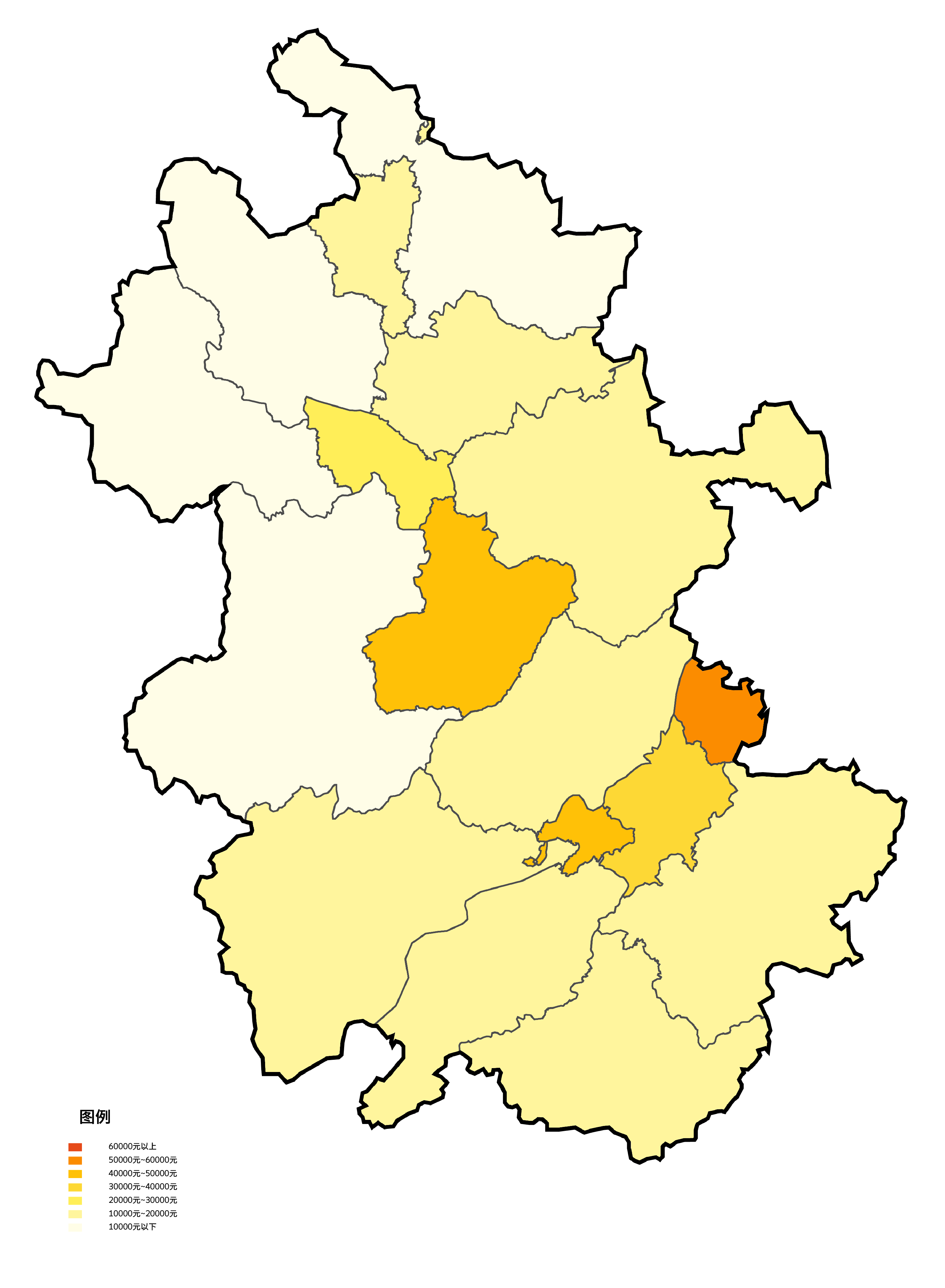 安徽省各地级市根据2009年人均地区生产总值填色地图